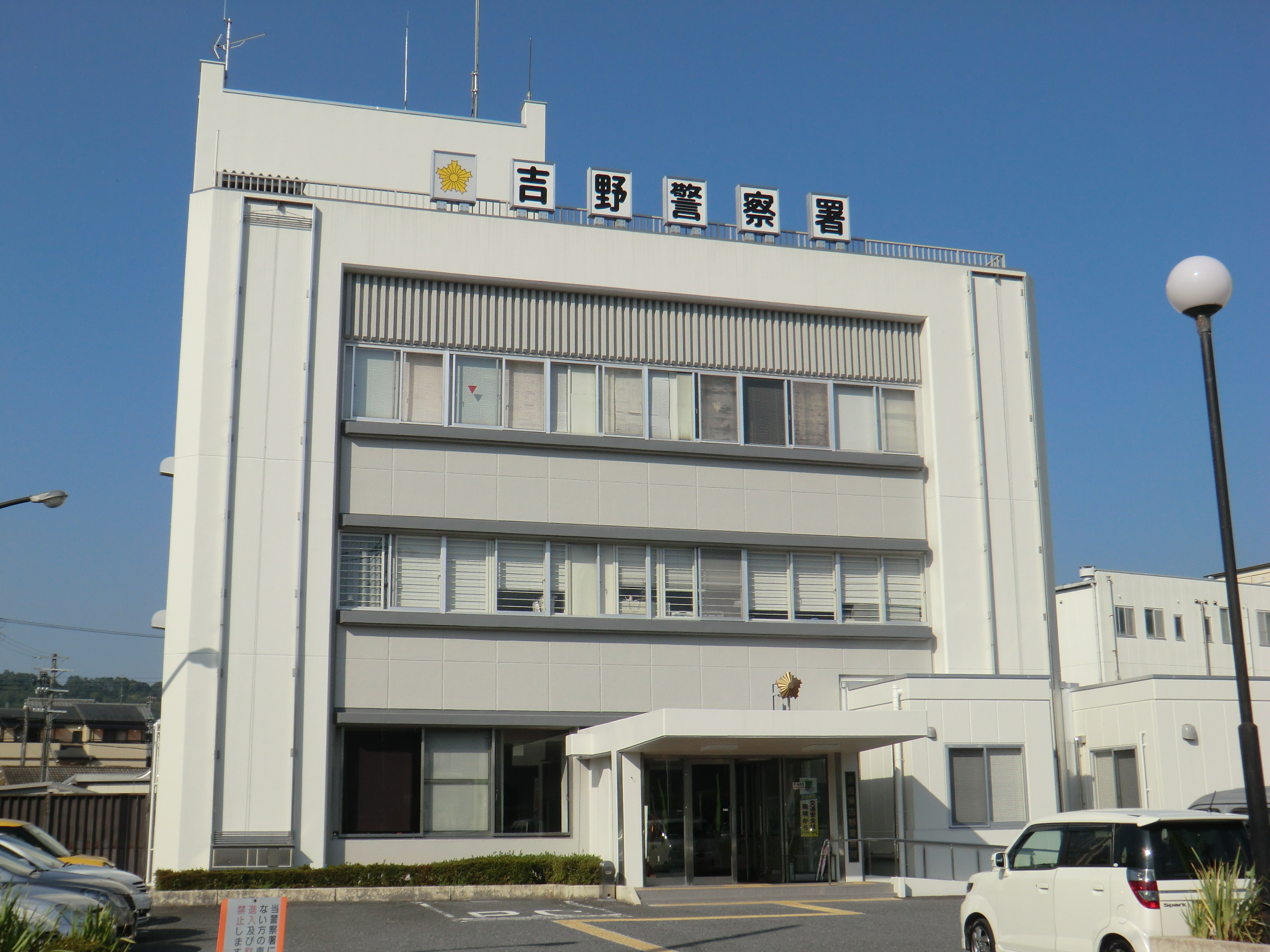 奈良県警察吉野警察署、2014年。